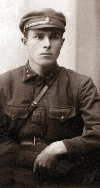 Это фотография умершего человека генерал-полковника танковых войск И. З. Сусайкова. фотография снята не позже 1928 года.